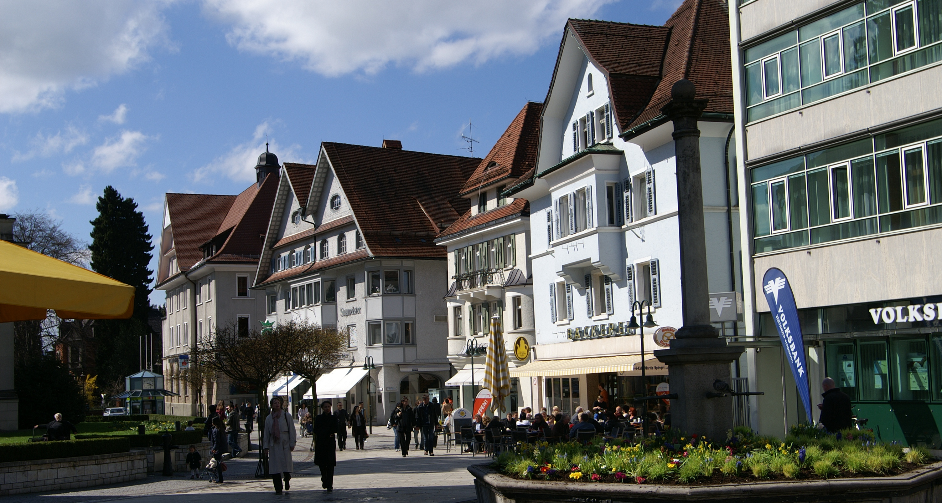 Häuserzeile am Marktplatz in Dornbirn